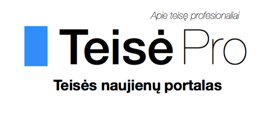 Portalo teise.pro logotipas